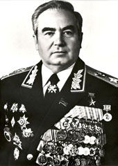 Il maresciallo dell'Unione Sovietica Viktor Kulikov, capo di stato maggiore generale delle forze armate sovietiche e comandante in capo del Patto di Varsavia